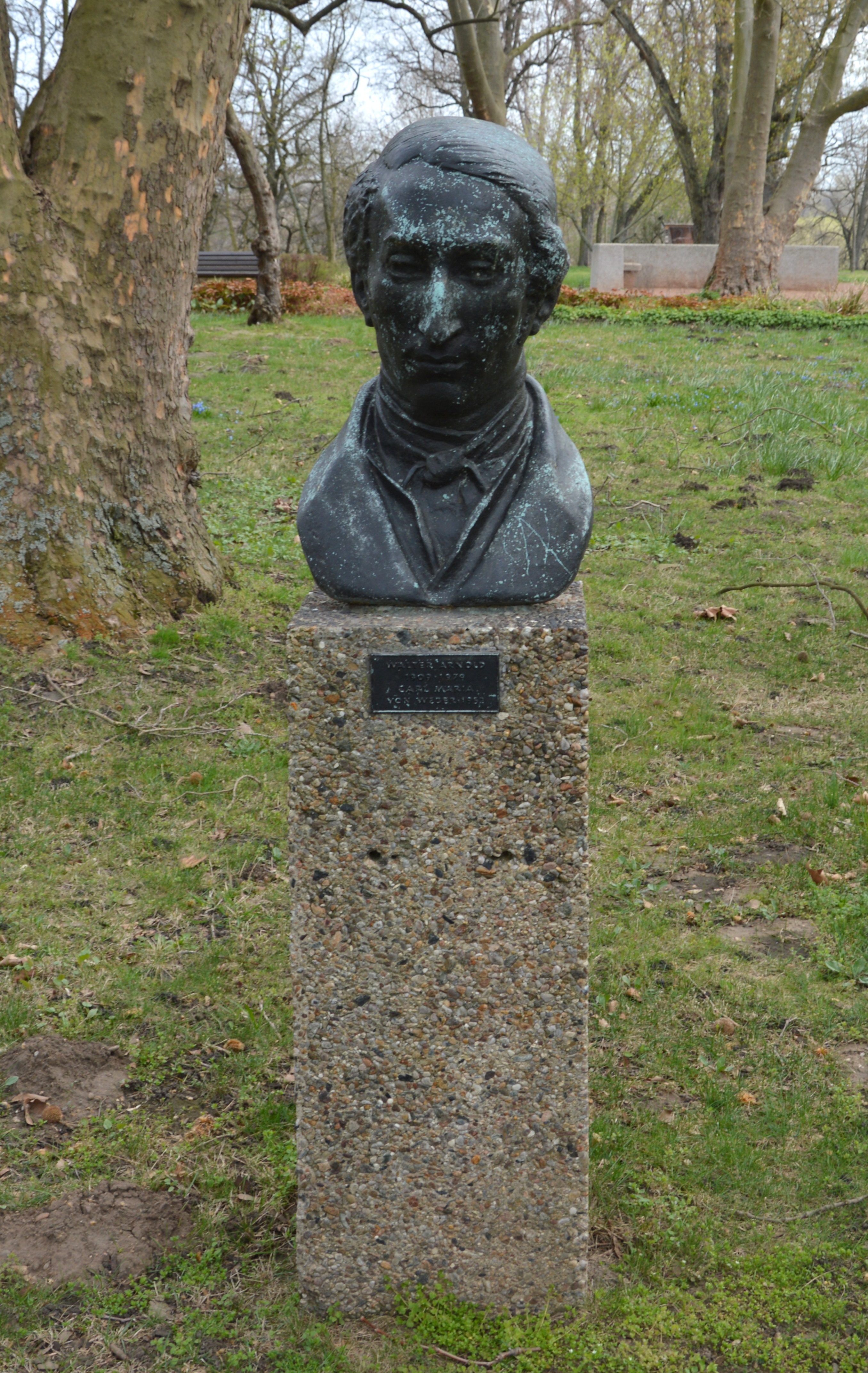 Büste Carl Maria von Weber im Plastikpark Leuna